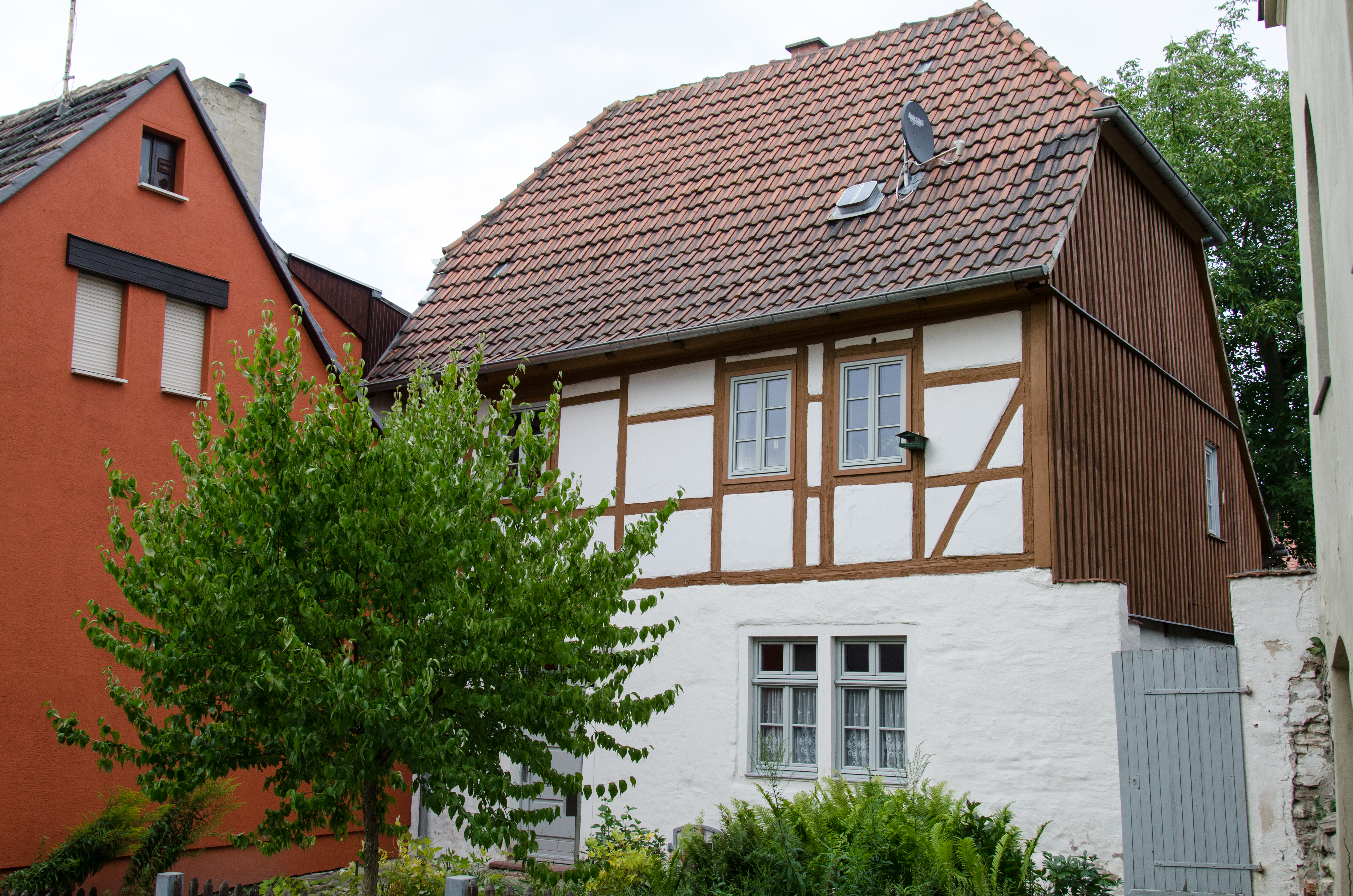 Sangerhausen, Hinter der Ulrichkirche 2